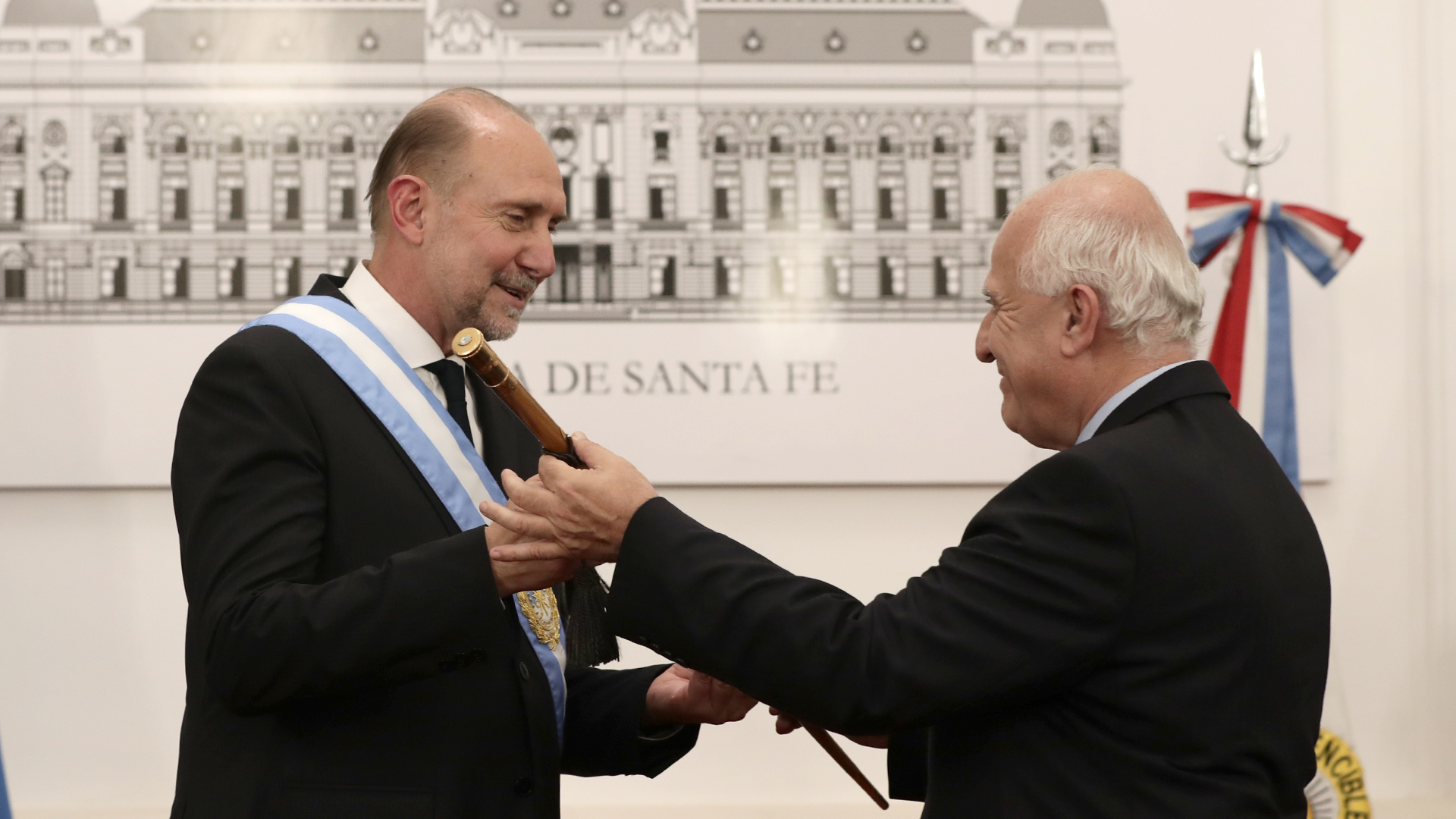 El gobernador de Santa Fe, Omar Perotti recibió los atributos, la banda y el bastón, de manos del gobernador saliente, Miguel Lifschitz, en el Salón Blanco.